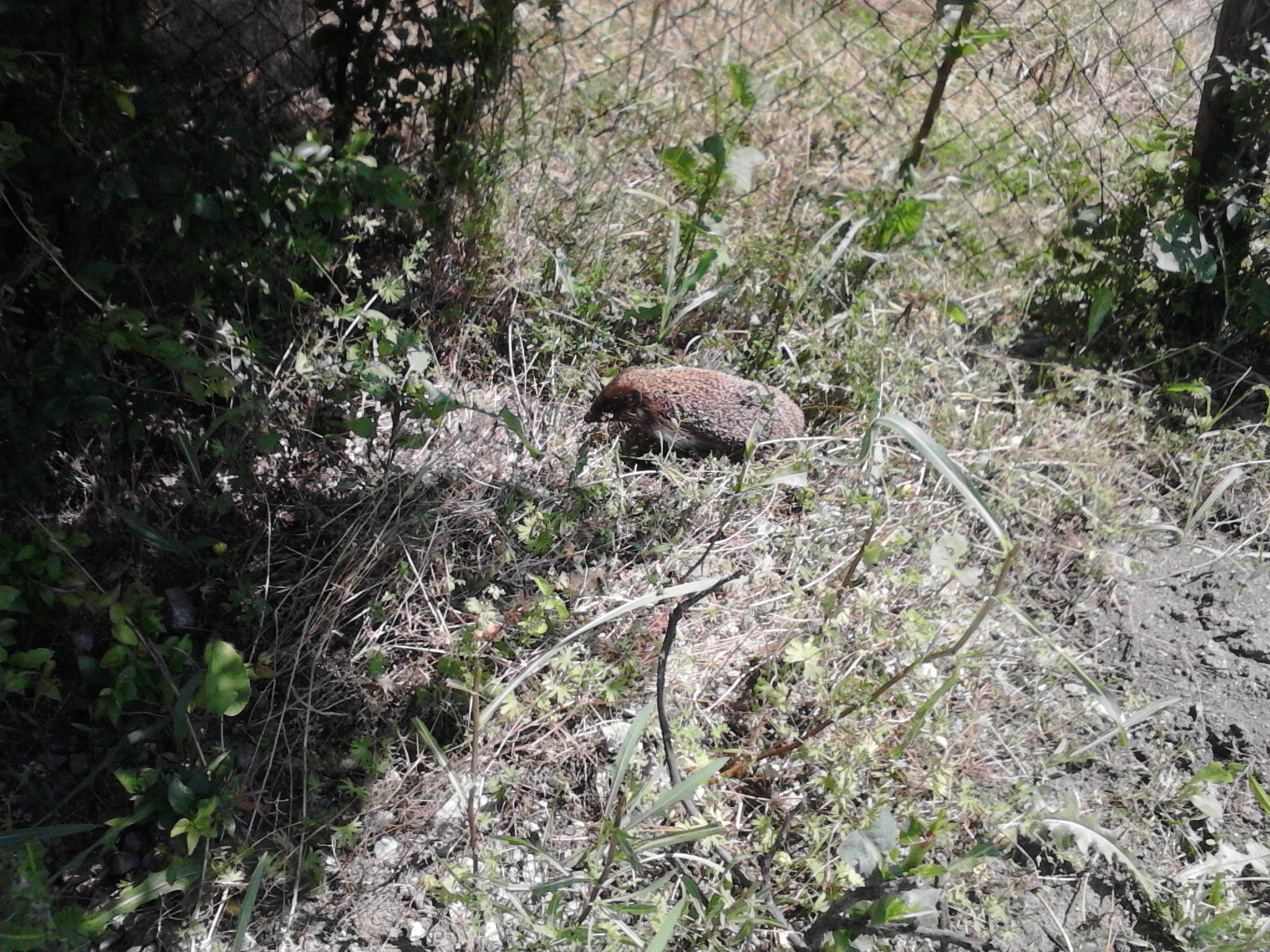 Srpski (latinica): Jež uslikan u Batočini